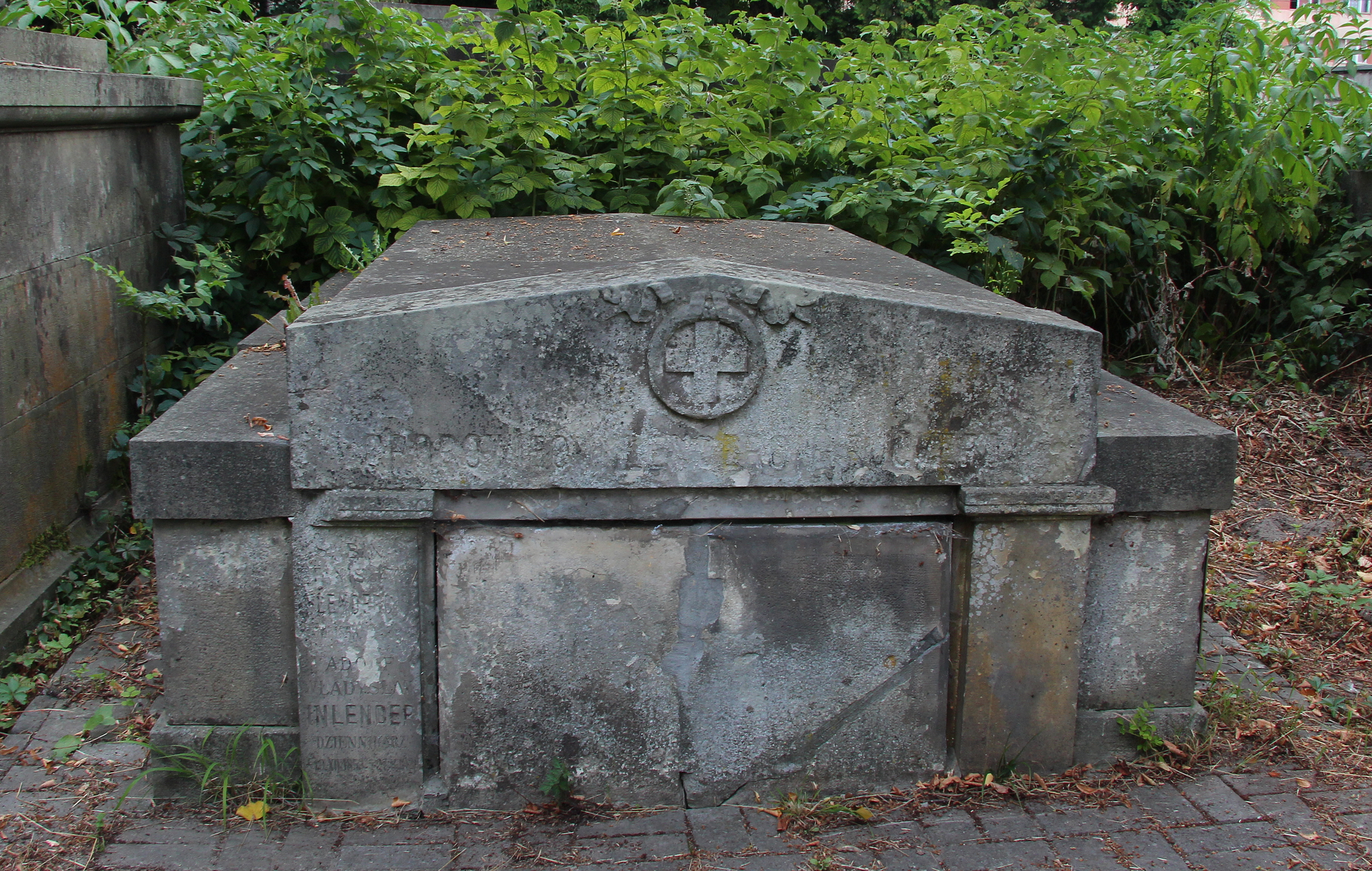 Адольф Інлендер . Личаківський цвинтар , поле 1а.